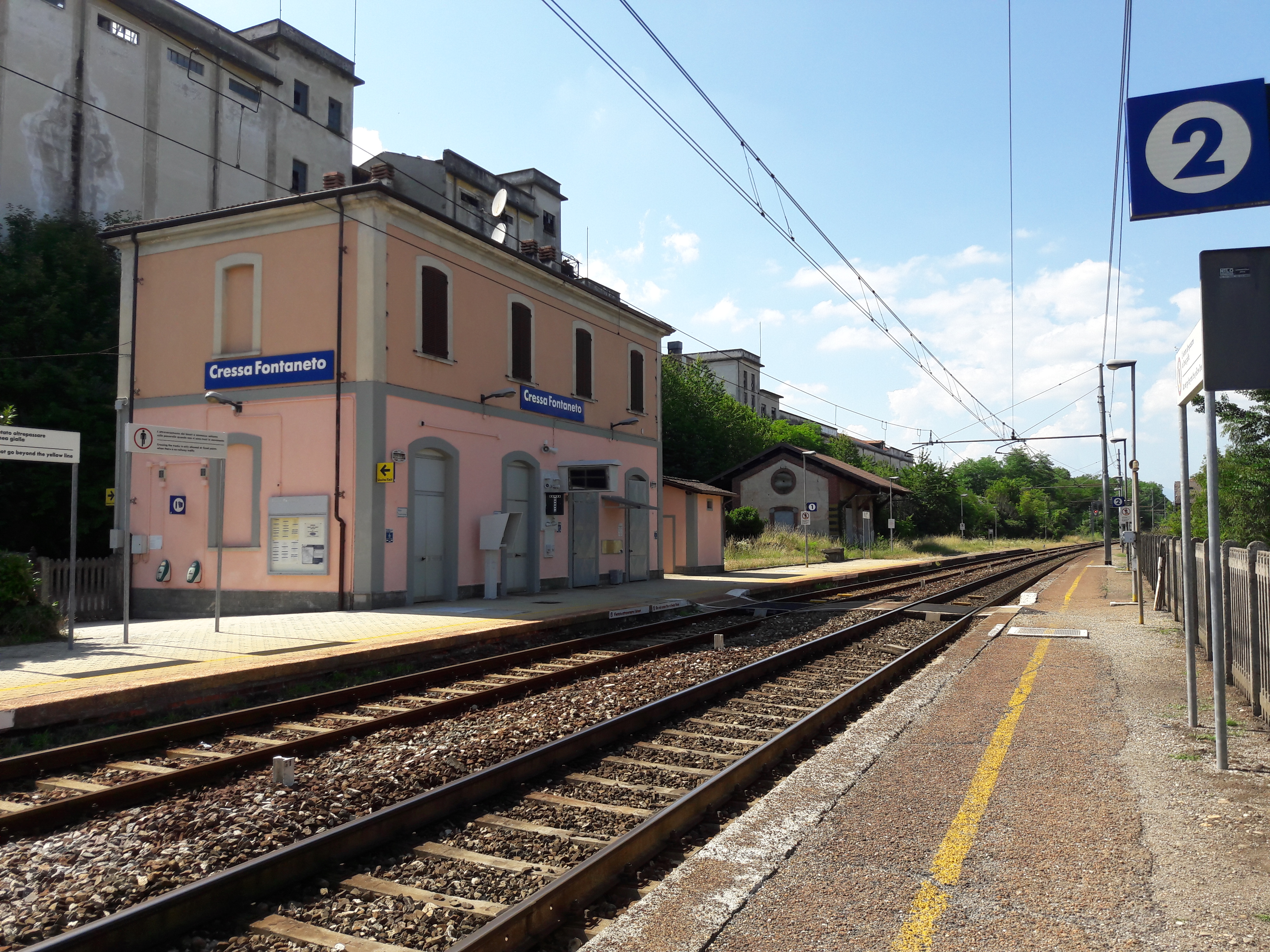 Stazione lato binari, in direzione Domodossola.